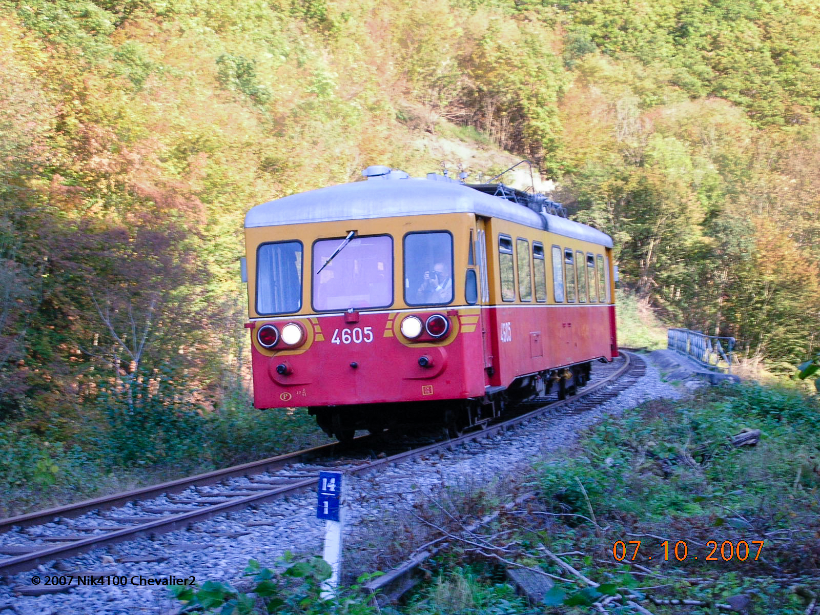 Autorail 4605 PFT-TSP en 2007, en gare de Purnode, terminal de la ligne 128 à l'époque. Autorail en révision depuis lors et toujours pas opérationnel en 12/2019